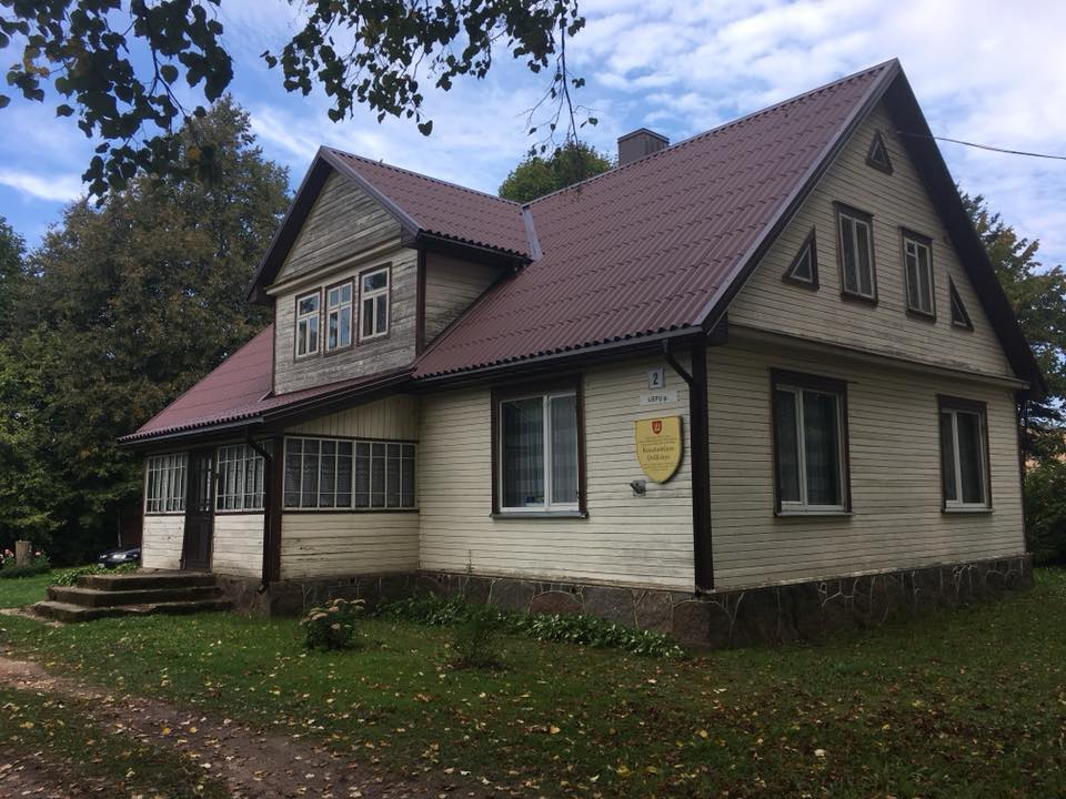 Konstantino Dulksnio gimtoji sodyba